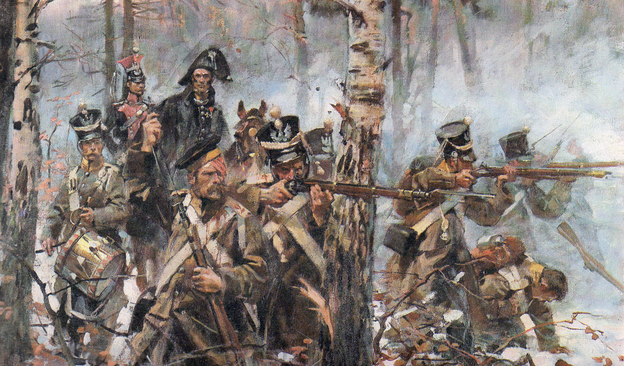 Olszynka Grochowska 1831 (fragment)